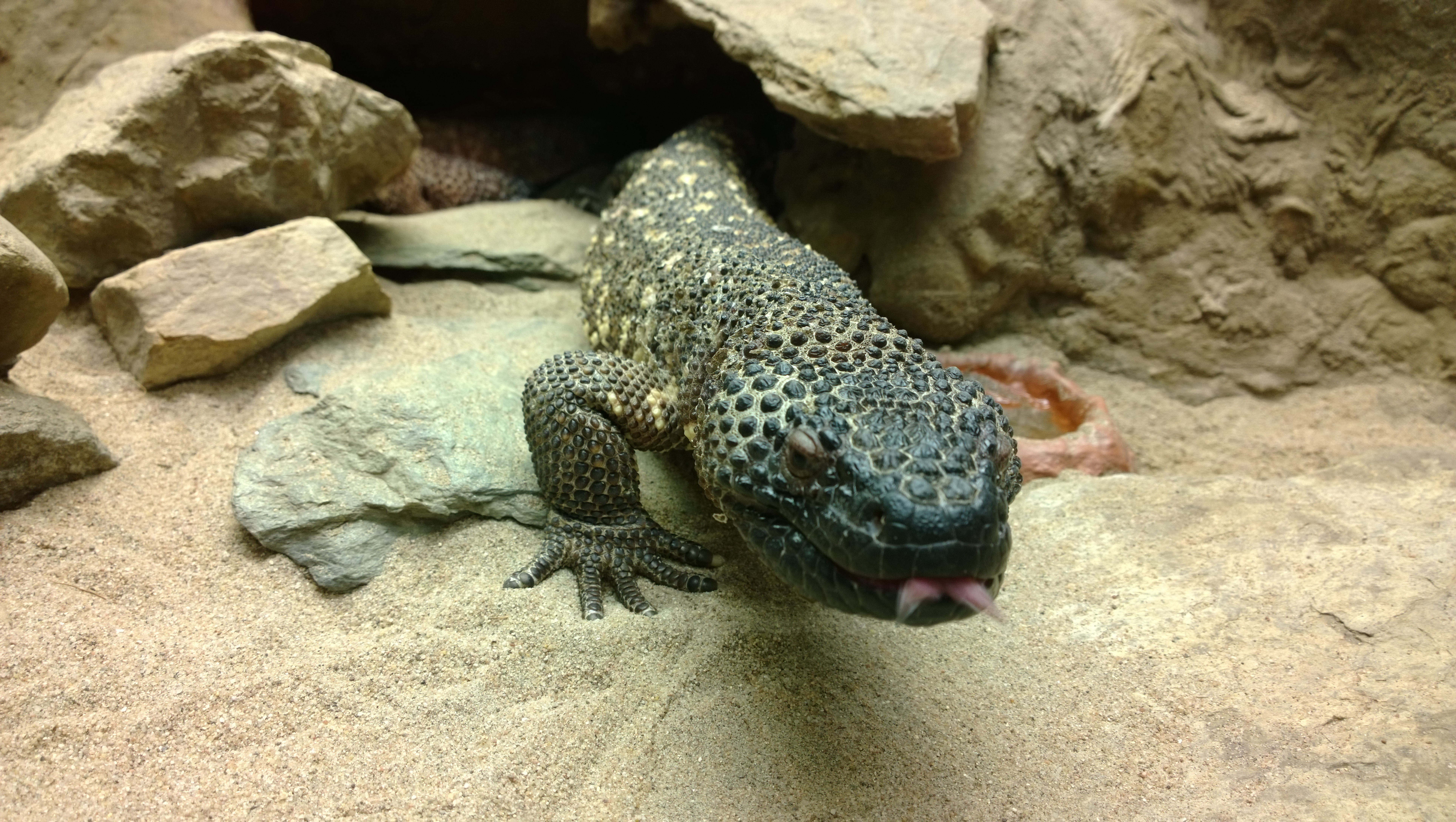 Skorpionskrustenechse im Opel-Zoo nahe Frankfurt, Adresse: Opel-Zoo, Königsteiner Straße 35, D-61476 Kronberg